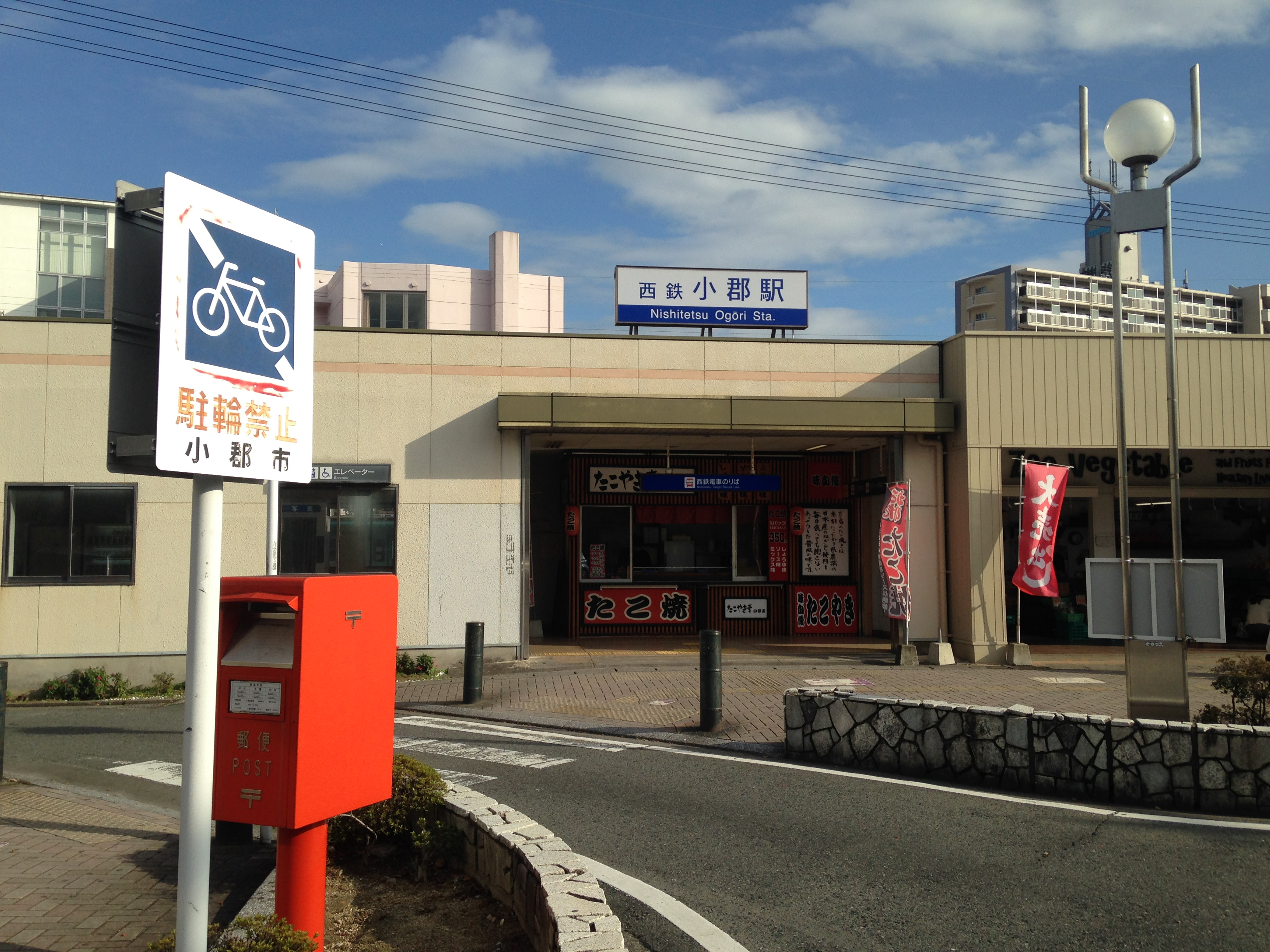 西鉄小郡駅駅舎